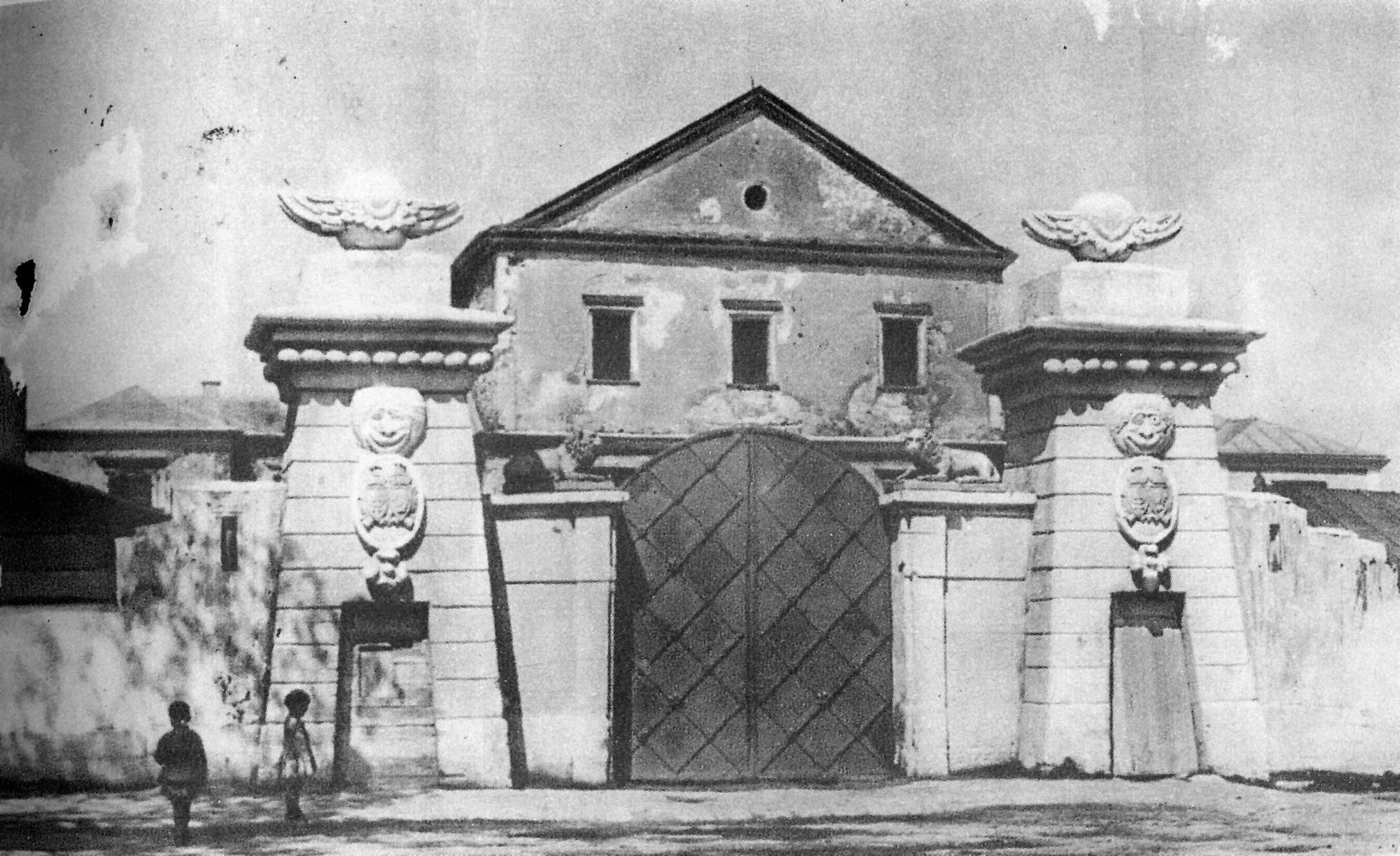 Тернопільський замок. ворота